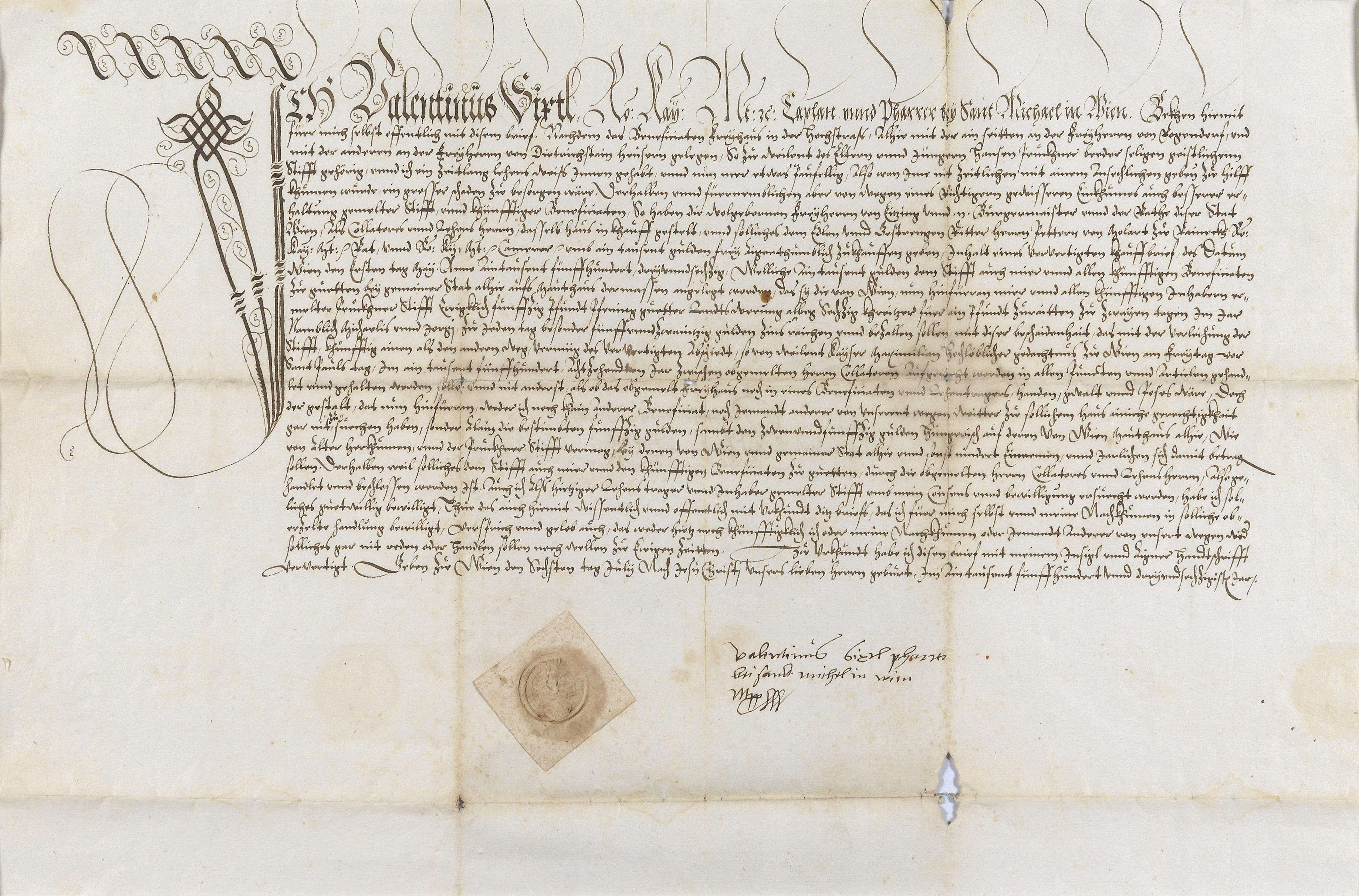 Valentin Sixtl, Kaplan und Pfarrer zu St. Michael, Verkaufsbrief des Freihauses in der Hochstraße (Vorgängerbau des 1695 barockisierten Palais Mollard-Clary in der Herrengasse 9) an Peter von Mollard, Wien, 6. Juli 1563, mit eigenhändiger Unterschrift und papiergedrucktem Siegel des Valentin Sixtl, Papierurkunde, 43 x 57 cm